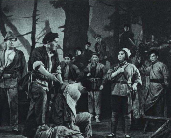 1964-04 1964年 中国青年艺术剧院 杜鹃山